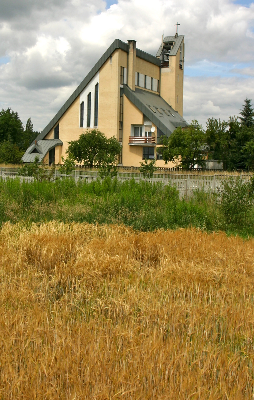 Górażdże (dodatkowa nazwa w j. niem. Goradze, 1935-45 Waldenstein – wieś w Polsce położona w województwie opolskim, w powiecie krapkowickim, w gminie Gogolin.